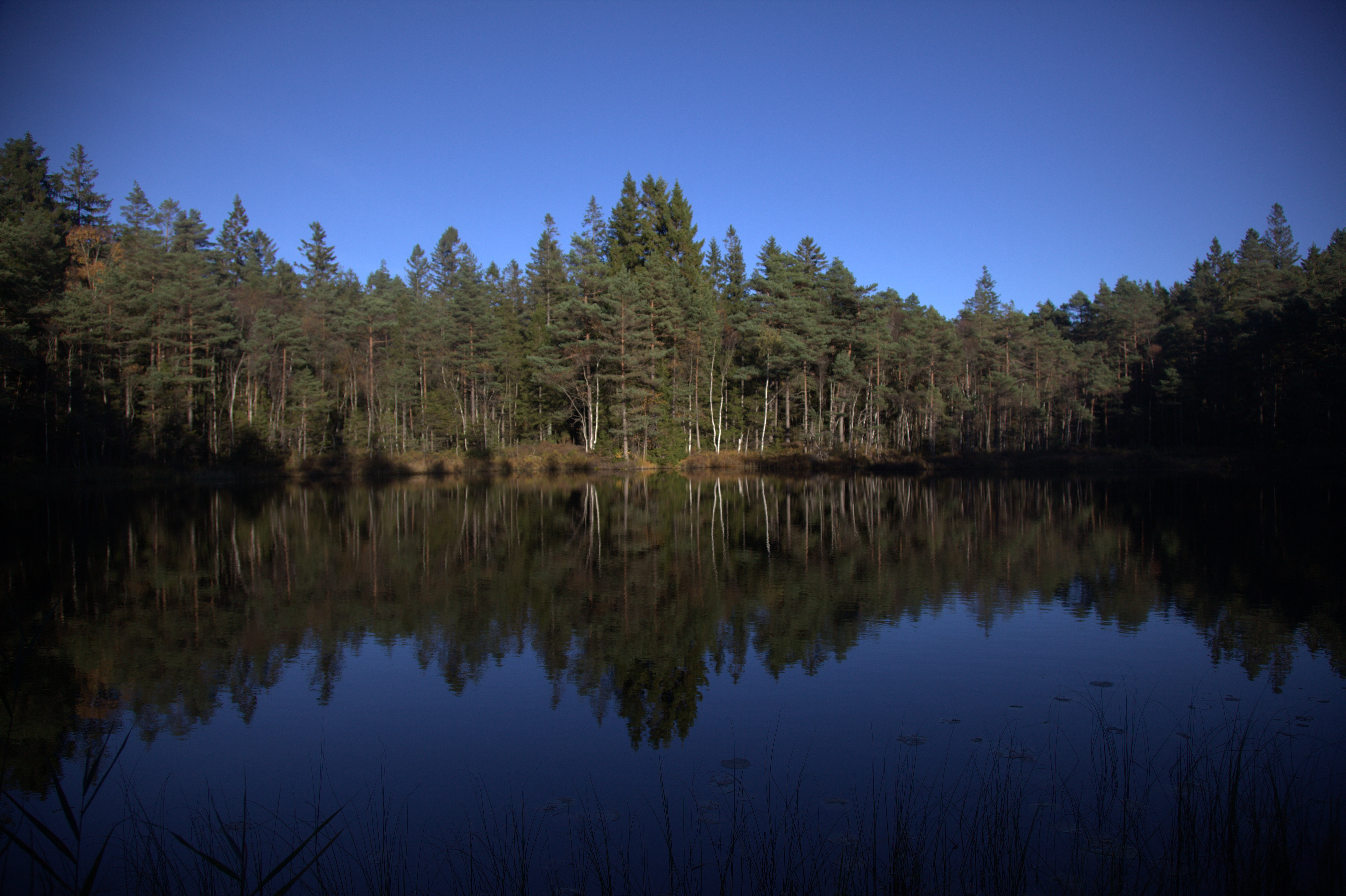 Ålevatten i Kungälvs kommun